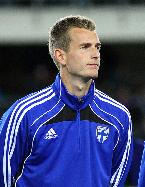 Jalkapalloilija Lukas Hradecky